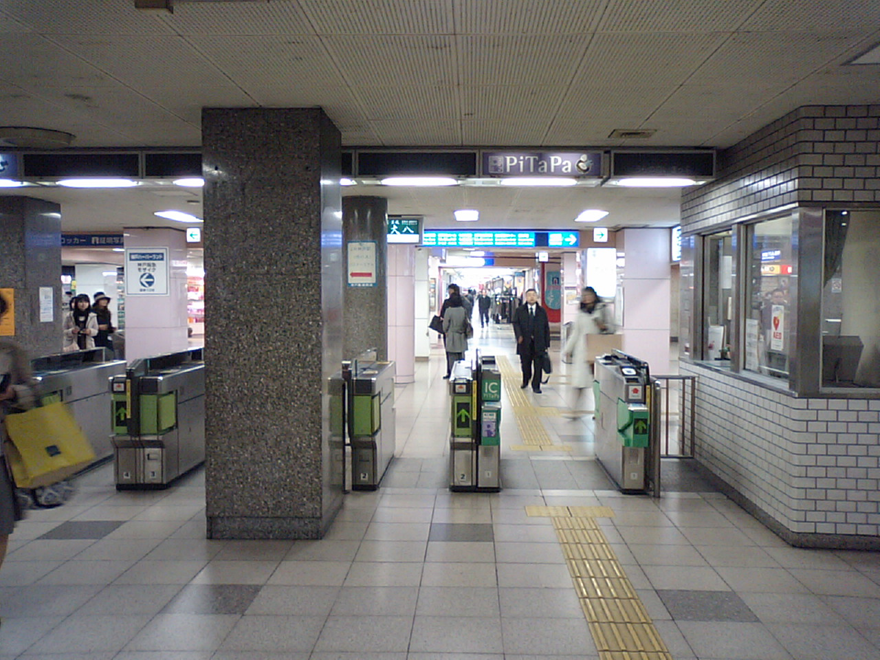 Kousoku Kobe station East gate